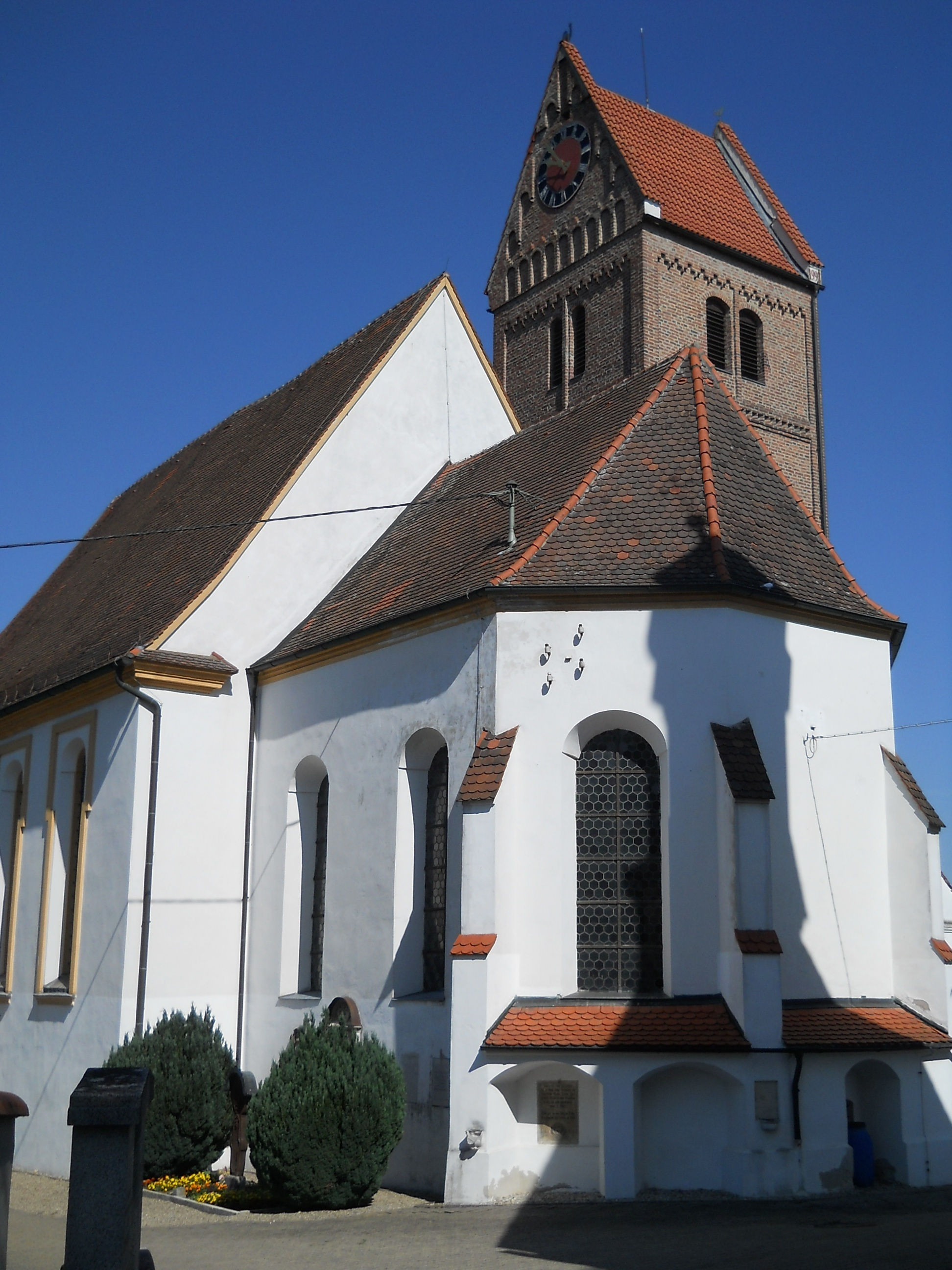 Gempfing (Ortsteil von Rain am Lech im Landkreis Donau-Ries), Kath. Pfarrkirche St. Vitus, Ostchor